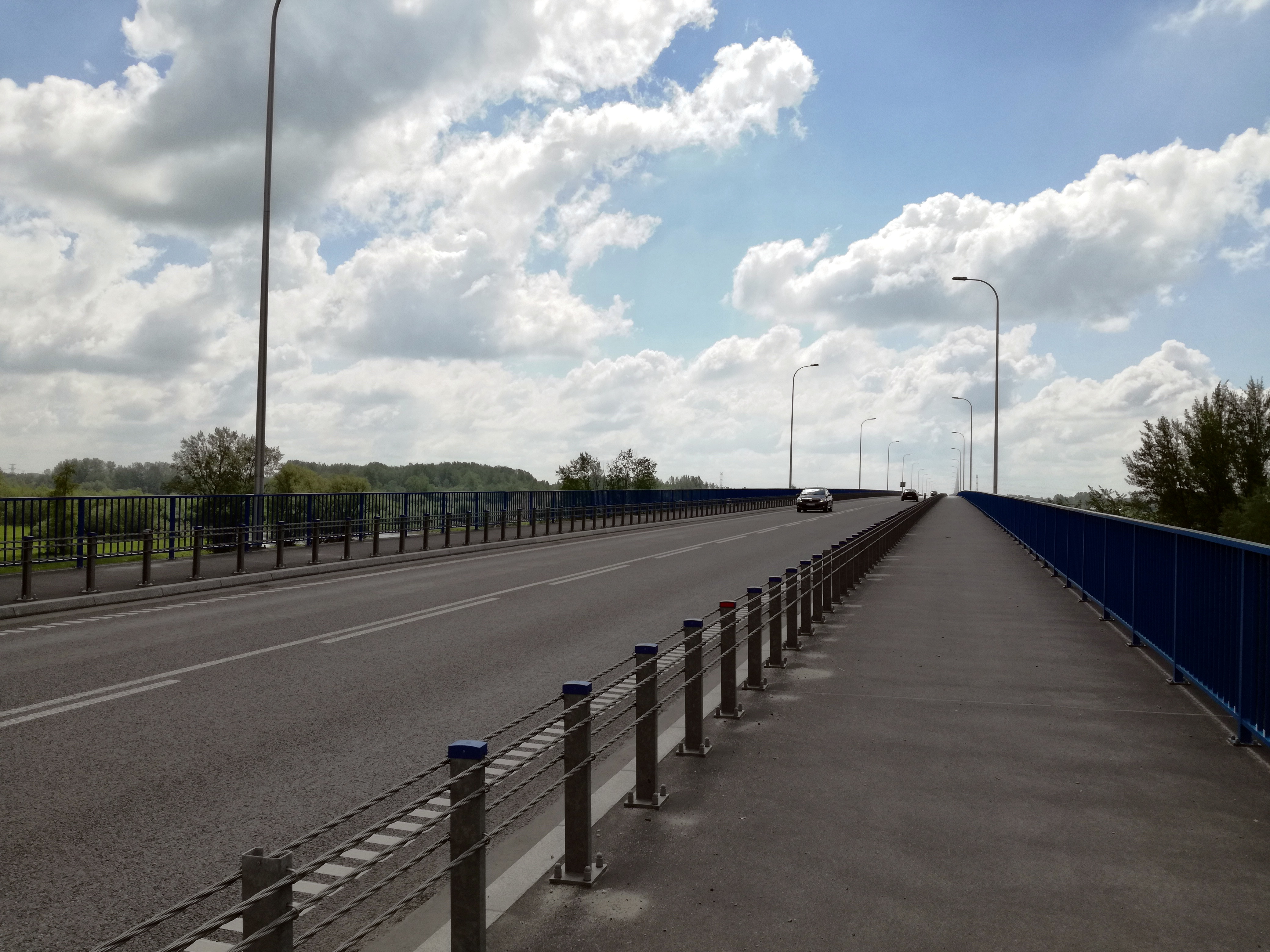 Most w Połańcu. Widok w stronę Mielca